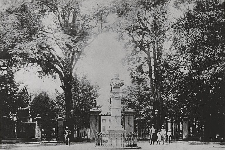 Statue à l'entrée du jardin colonial — Saint-Denis, Réunion